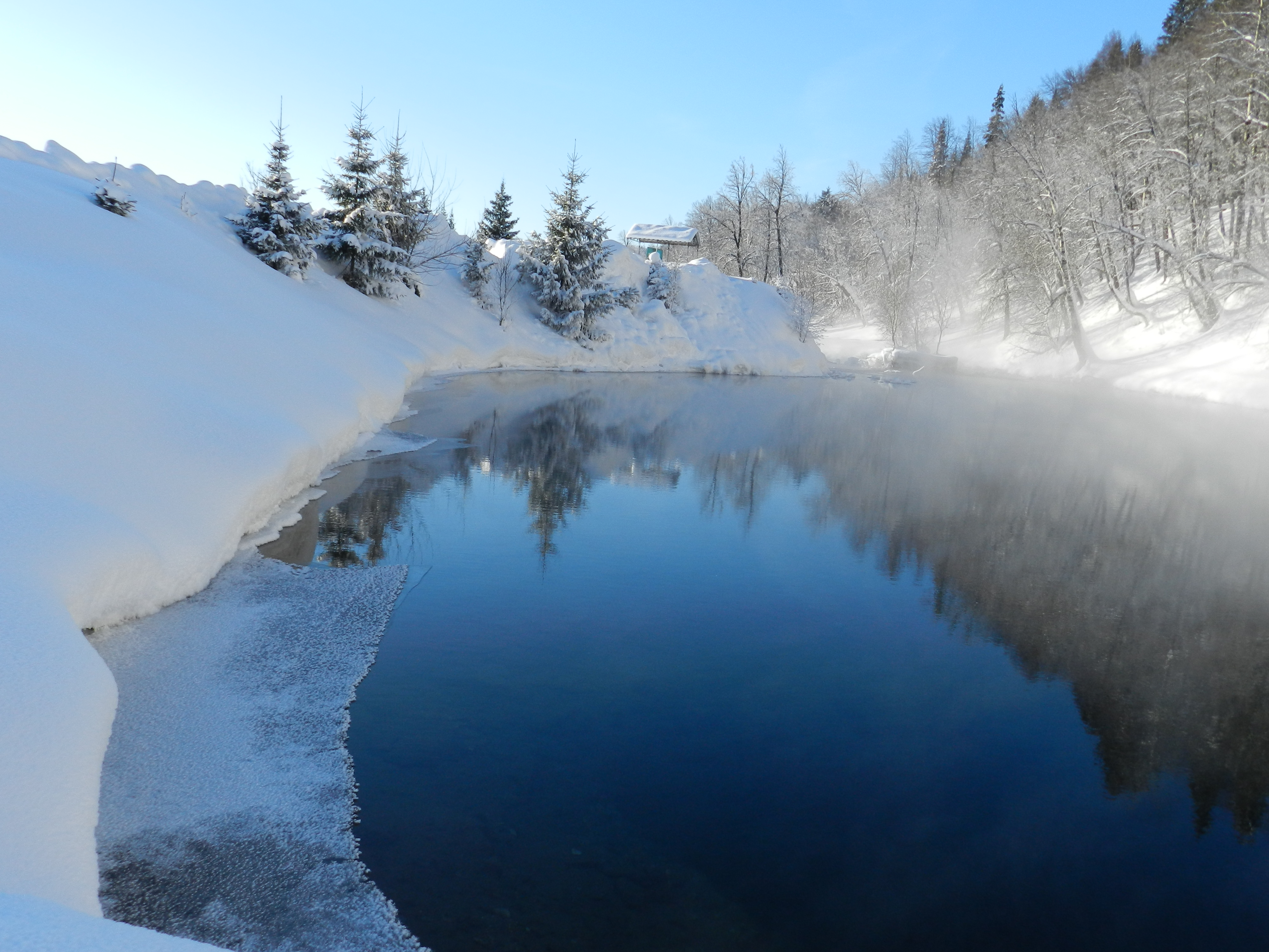 Сарвинское озеро, Нуримановский район This image is related to the protected area of Russia number 0210193